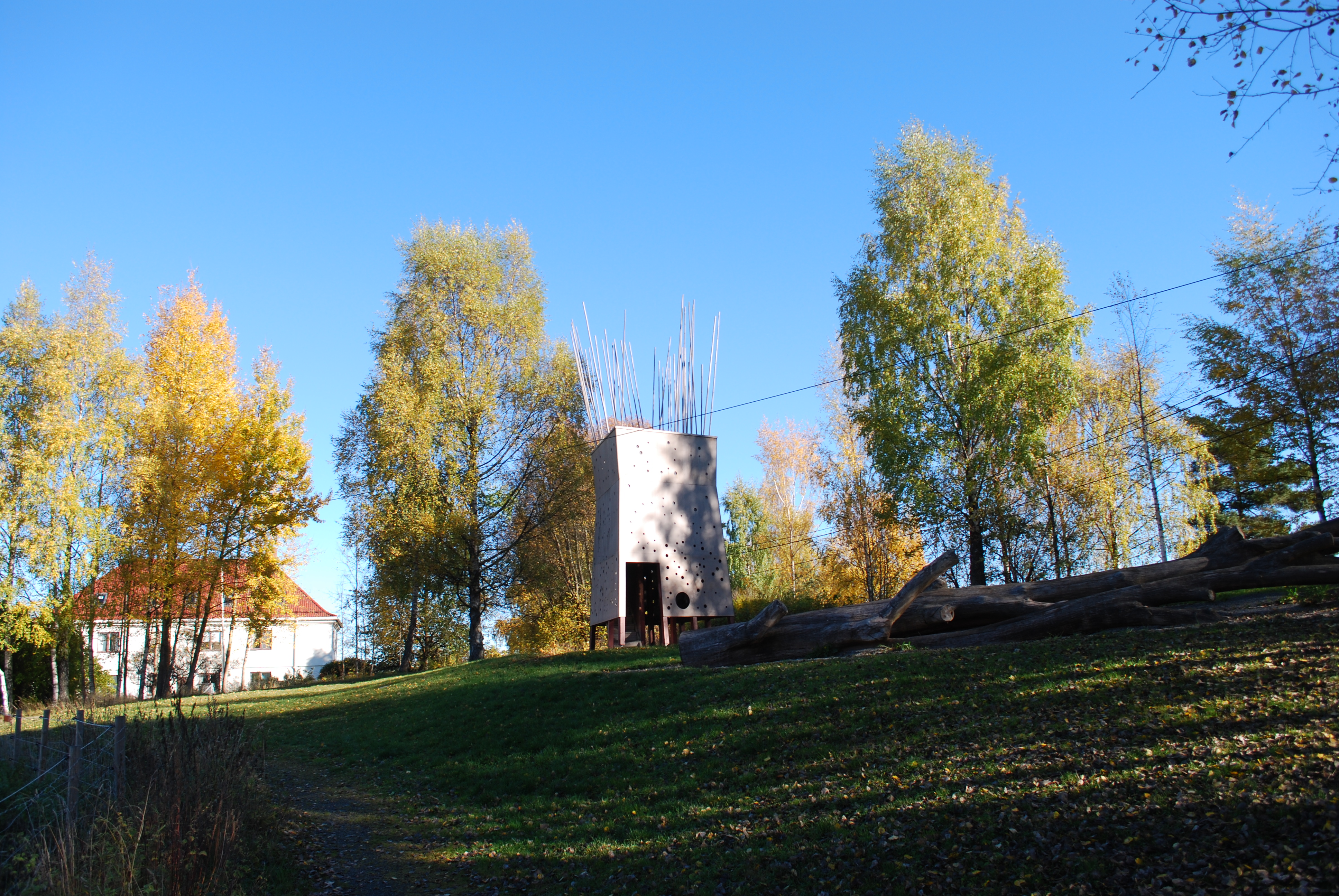 Furuset kulturpark, Oslo, utsiktstårnet